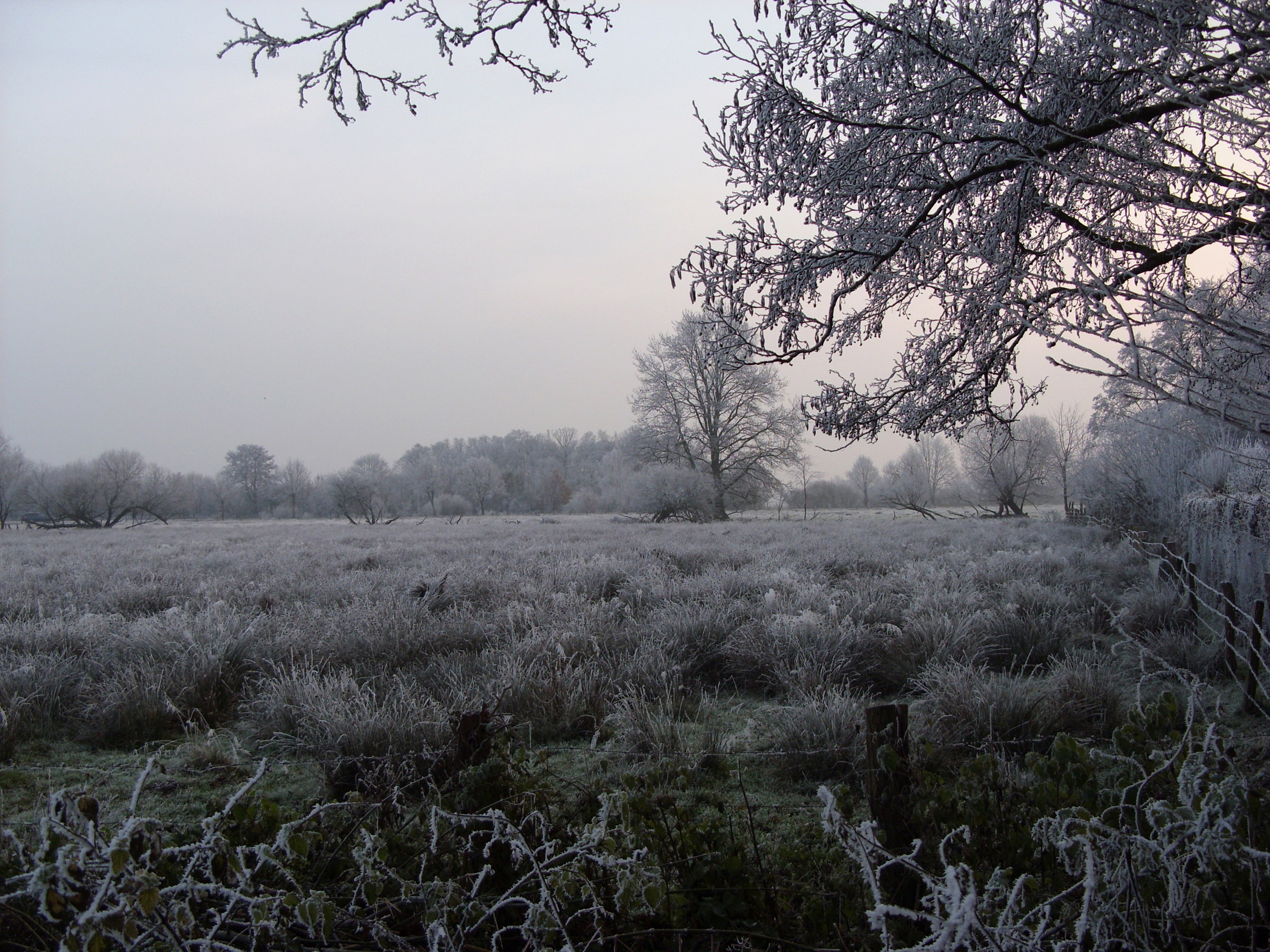 NSG Hohe Sieben. Blick von der Zuwegung des Wochenendhausgebietes "Schoddenhof" Richtung Hüde über die Wiesen der "Hohen Sieben".